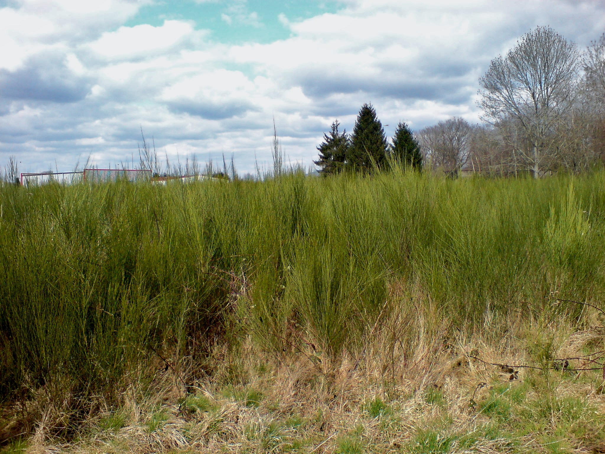 Brousailles pouvant être trouvée à Lure dans les friches.